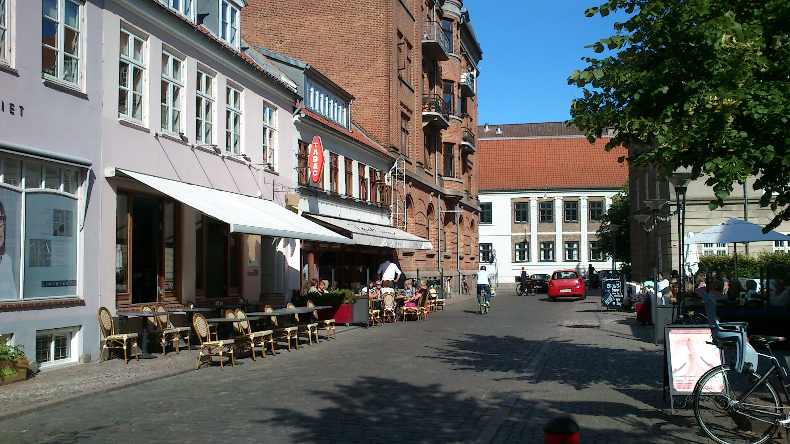 Café Casablanca i Latiner Kvarteret i Aarhus. Det er Aarhus Katedralskole for enden af gaden.